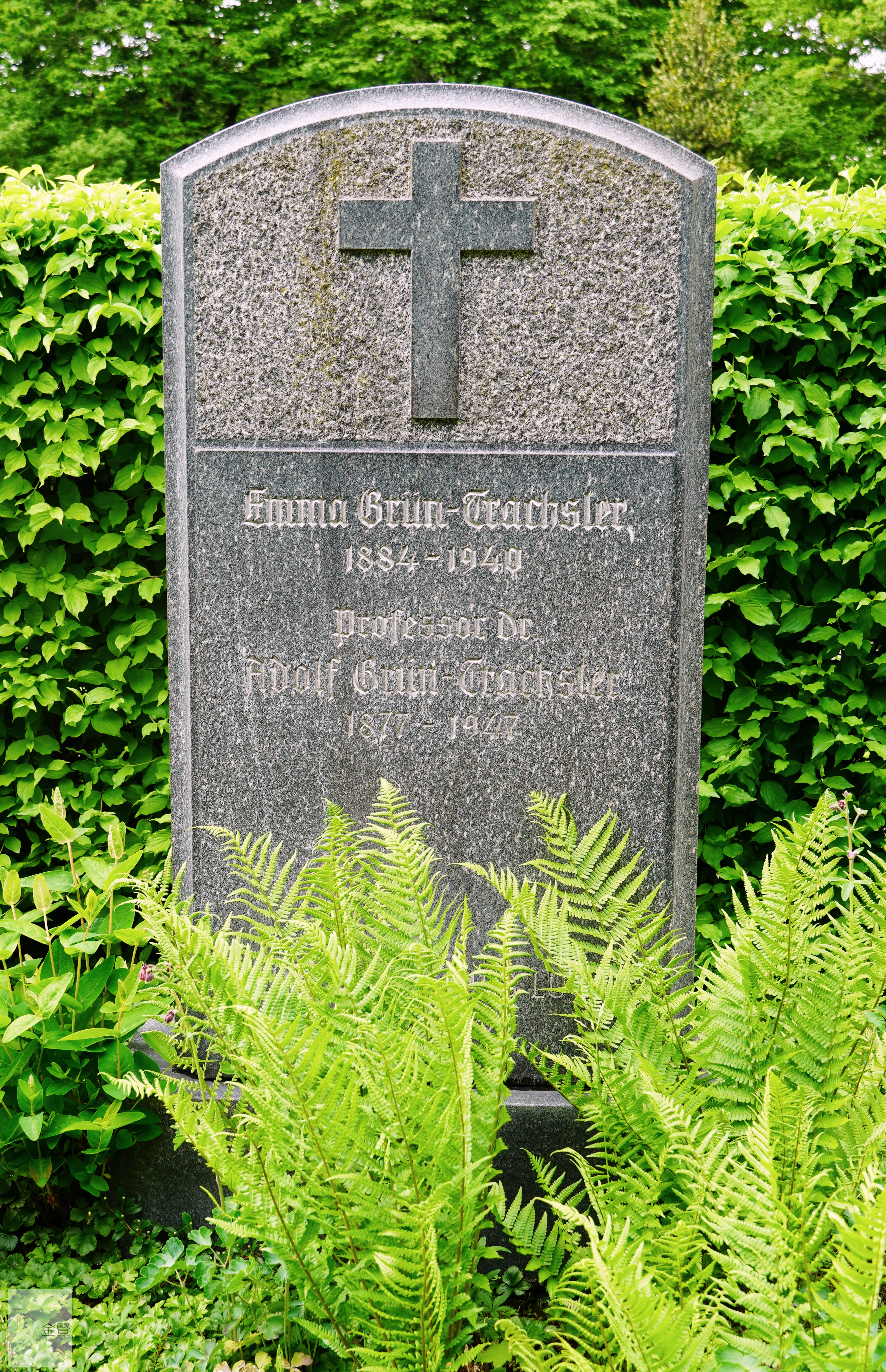 Grab von Adolf und Emma Grün